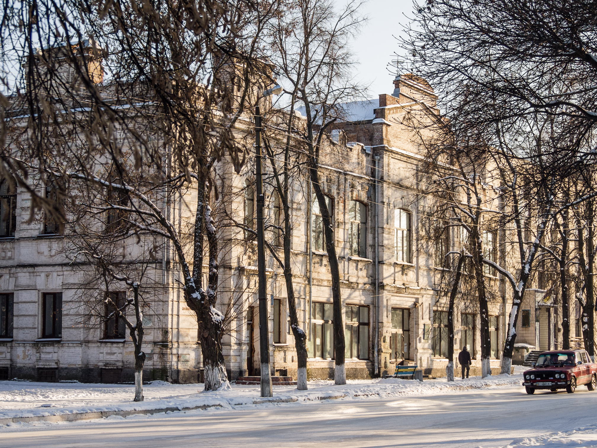 м. Лохвиця. Колишній будинок Товариства Сільських господарів (побуд. 1907 р.) Зараз в даному приміщенні - районна бібліотека